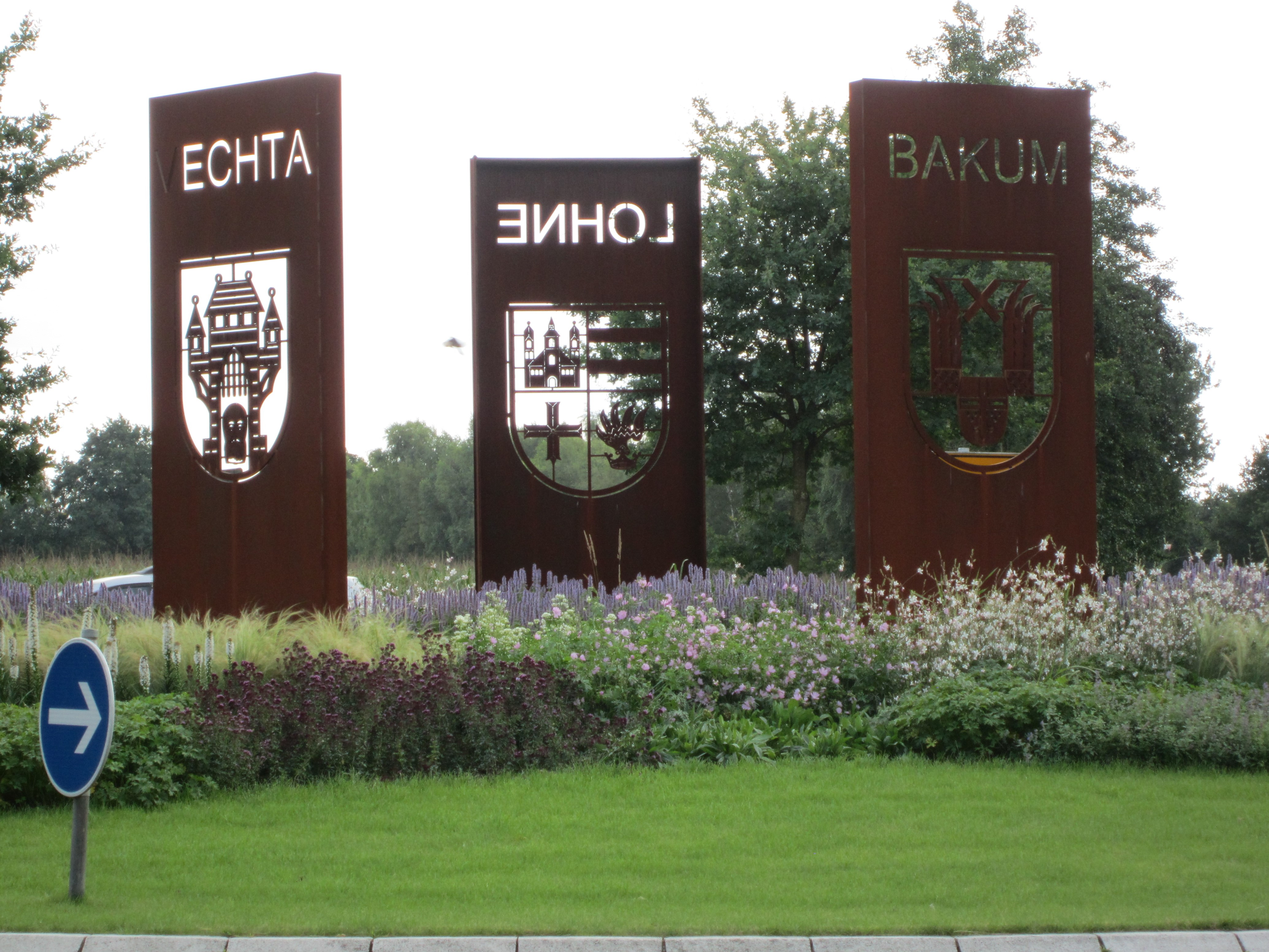 Drei-Kommunen-Eck beim Kreisel Daren (Bakum), Bokern (Lohne) und Vechtaer Westmark im Landkreis Vechta